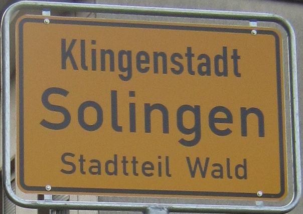 Neues Ortseingangsschild Standort Kotzerter Straße